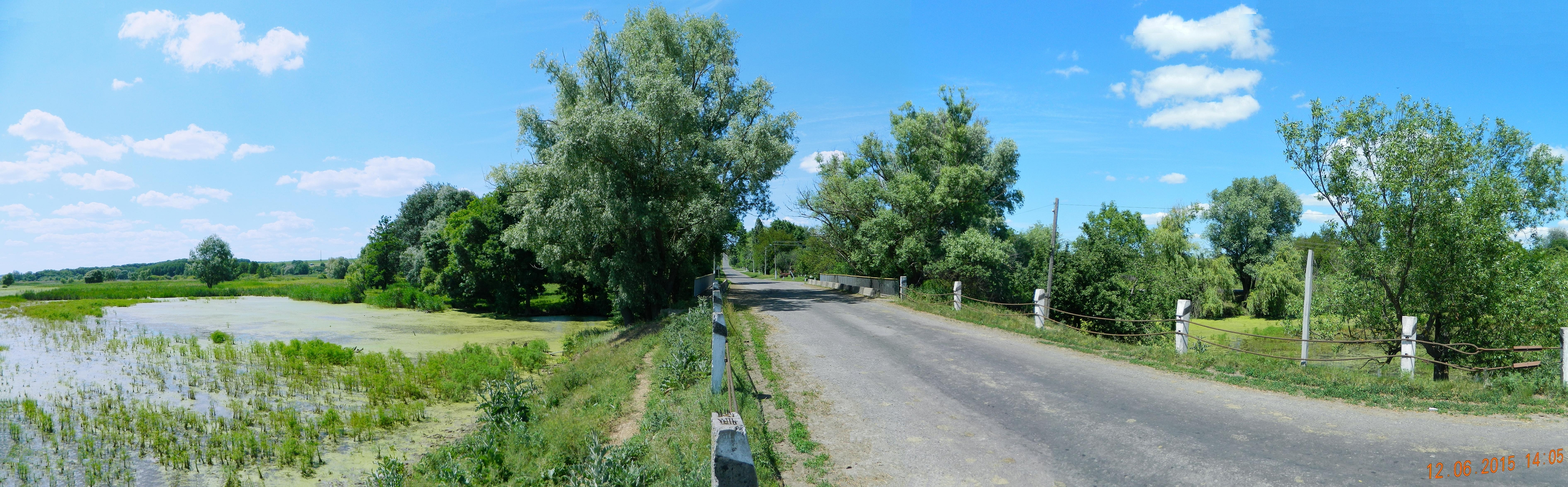 Міст через Кратову Говтву у селі Кратова Говтва. The bridge across the river Kratova Hovtva in the village Kratova Hovtva